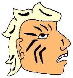 Glifo de Huehuetla, Hidalgo